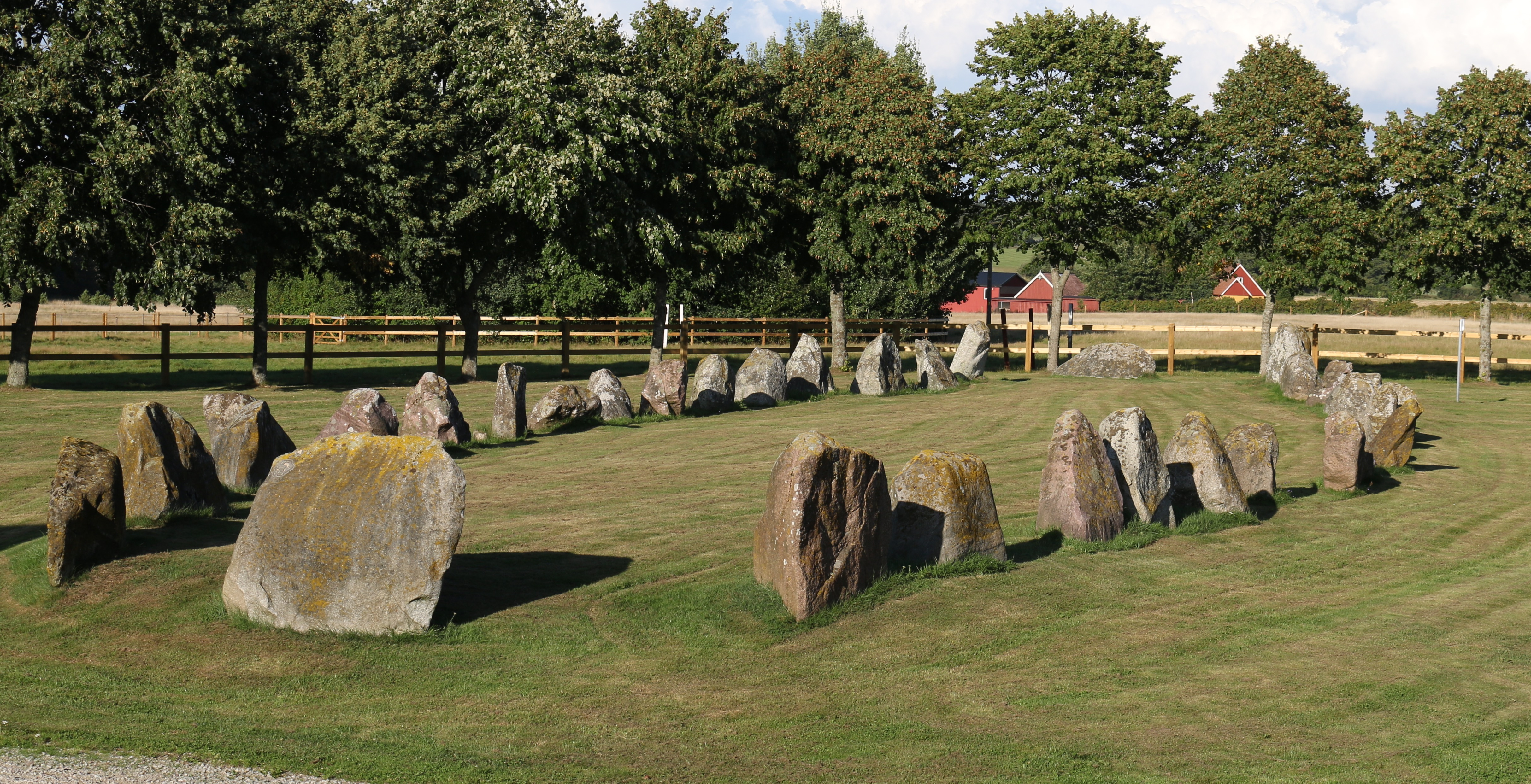 Södra Ugglarps skeppsättning